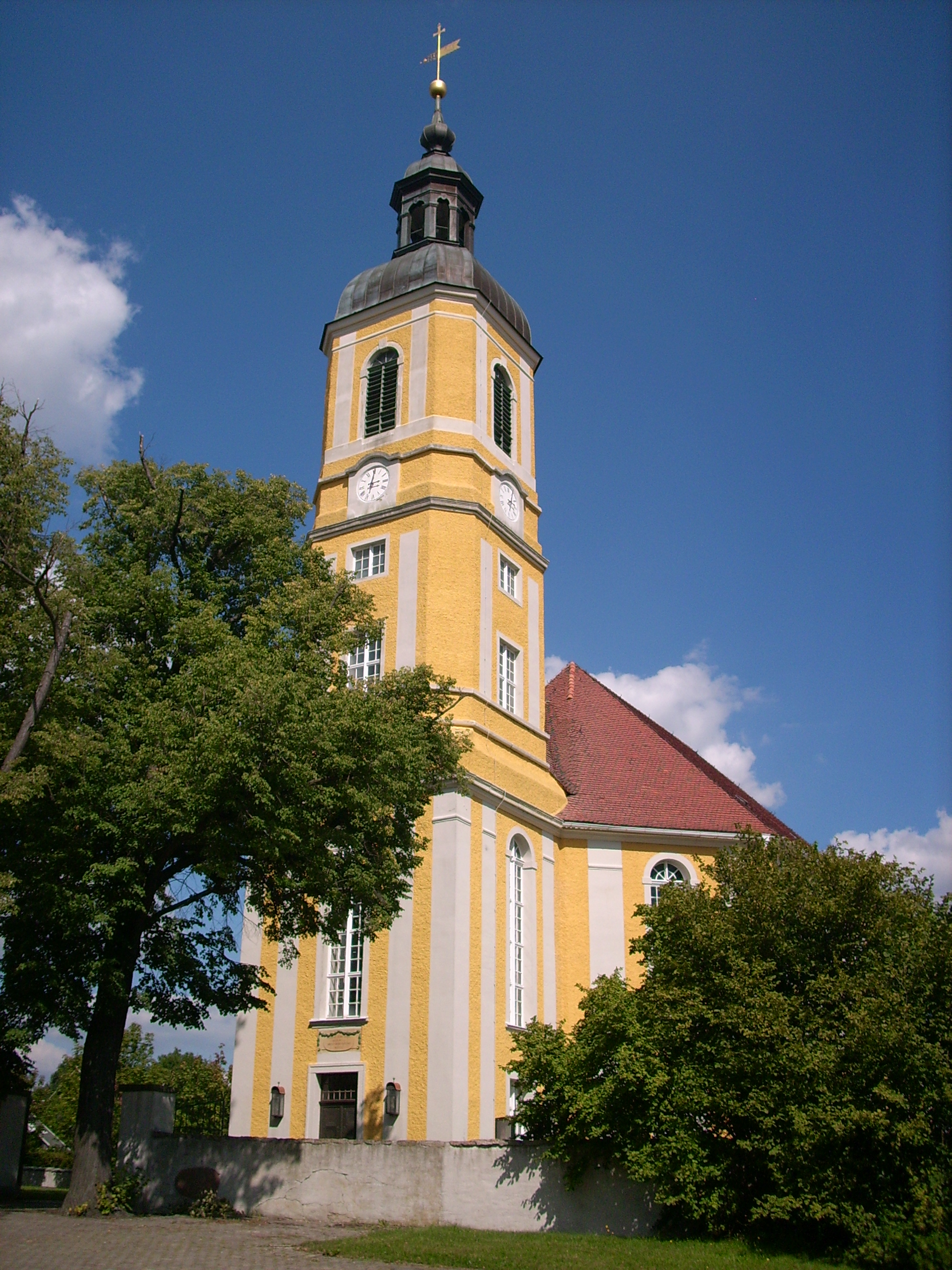 Evangelisch-lutherische Kirche in Oßling